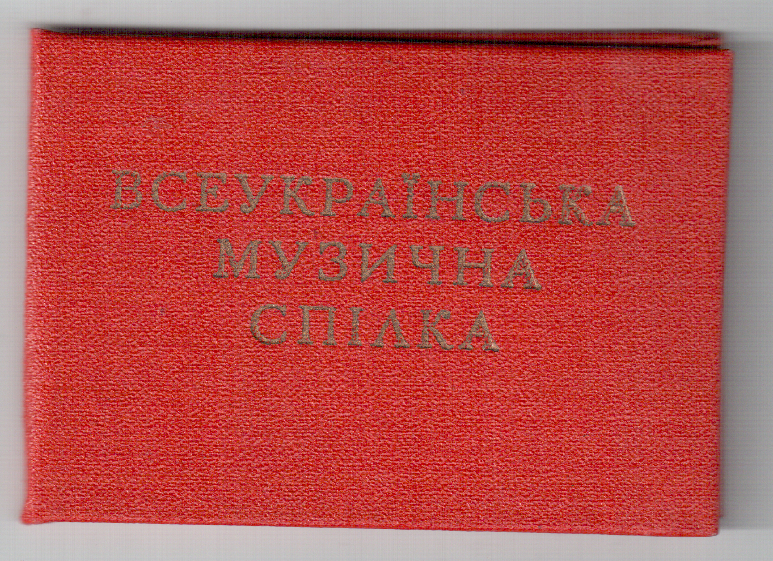 Обложка членского билета Всеукраинского музыкального союза (1995)